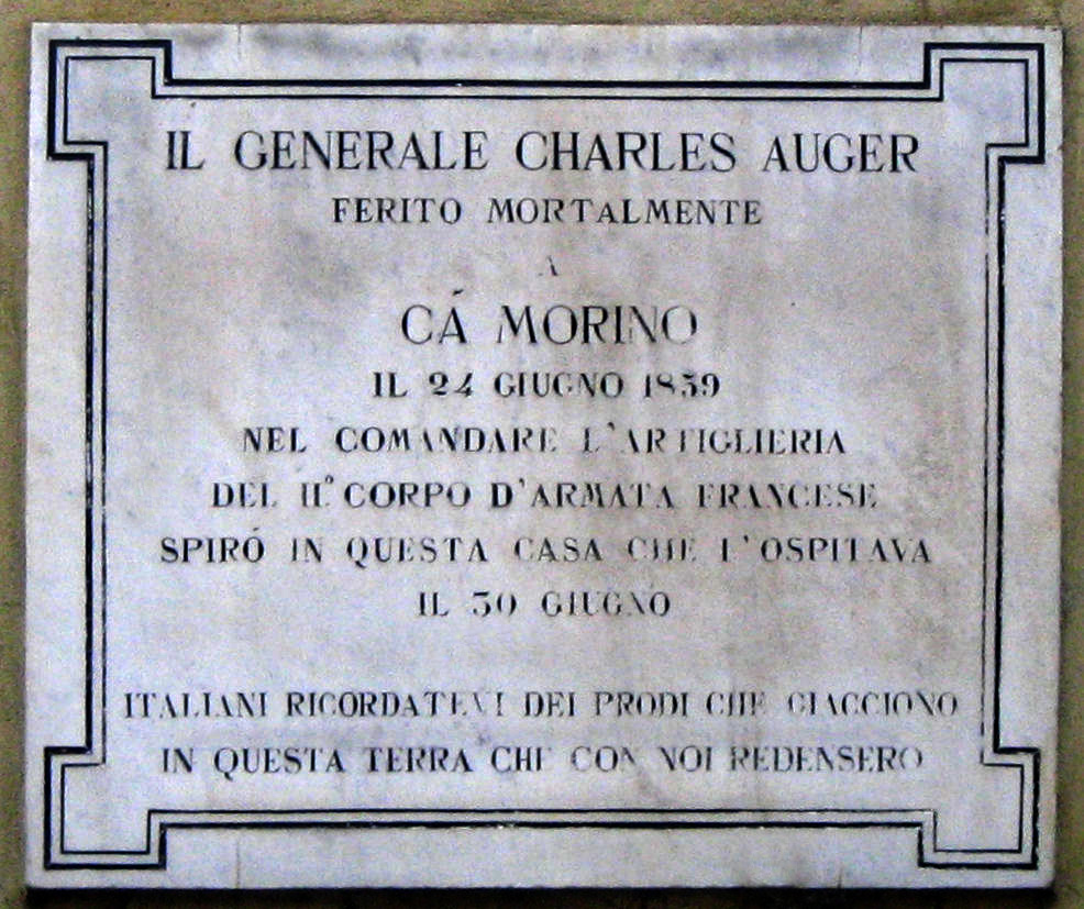 Castiglione delle Stiviere - Lapide al generale Charles Auger, ferito mortalmente nella Battaglia di Solferino e poi sostituito da Edmond Le Bœuf